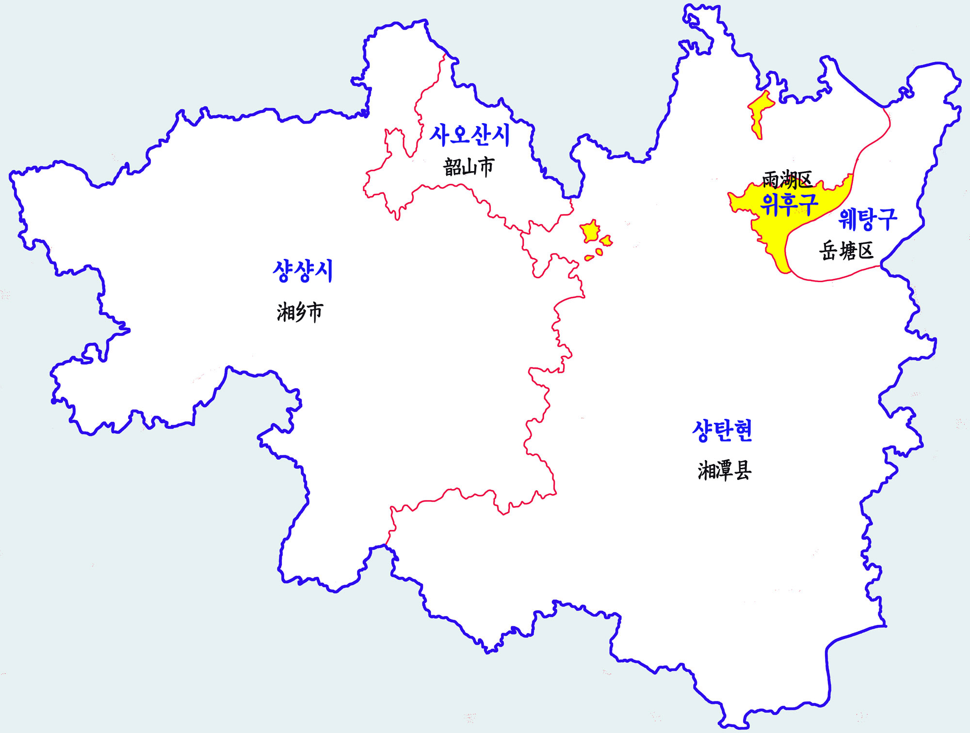 샹탼시 현급 행정구역